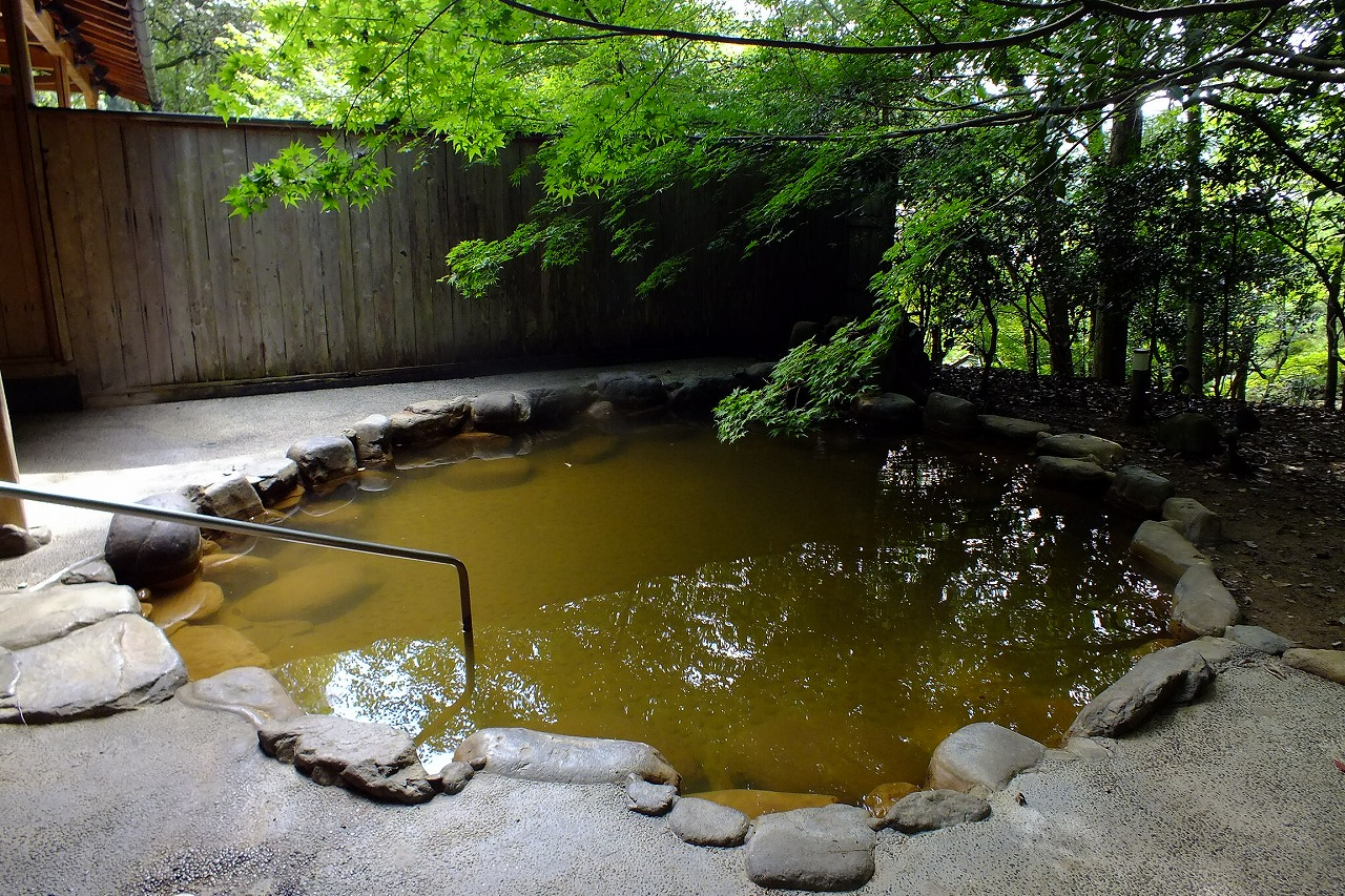 2015-10-01 Sioda-Onsen Ueyama Ryokan（湯元上山旅館）